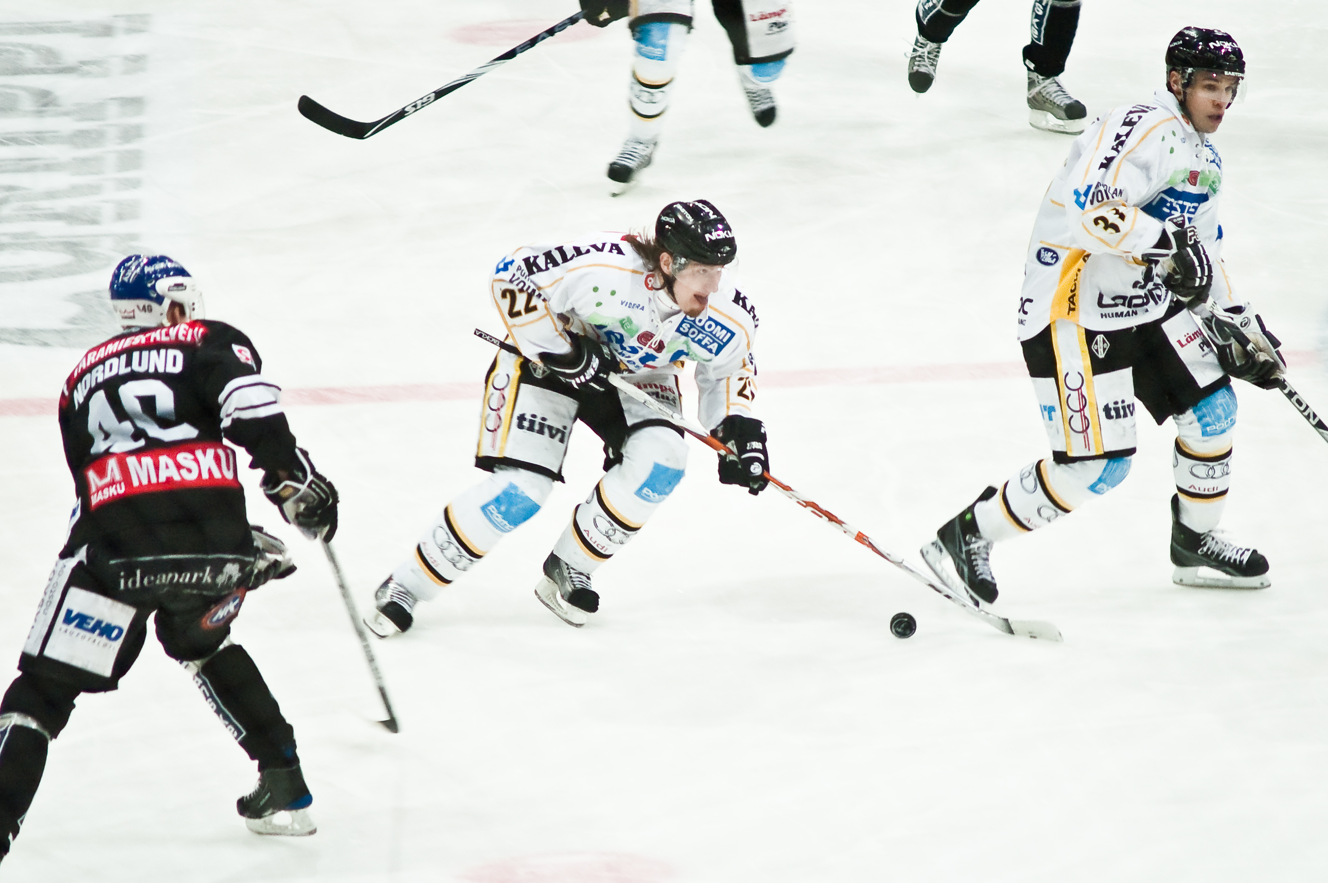 Kärpät, white jerseys: Lukáš Kašpar and Mika Viinanen. TPS, black jersey: Markus Nordlund